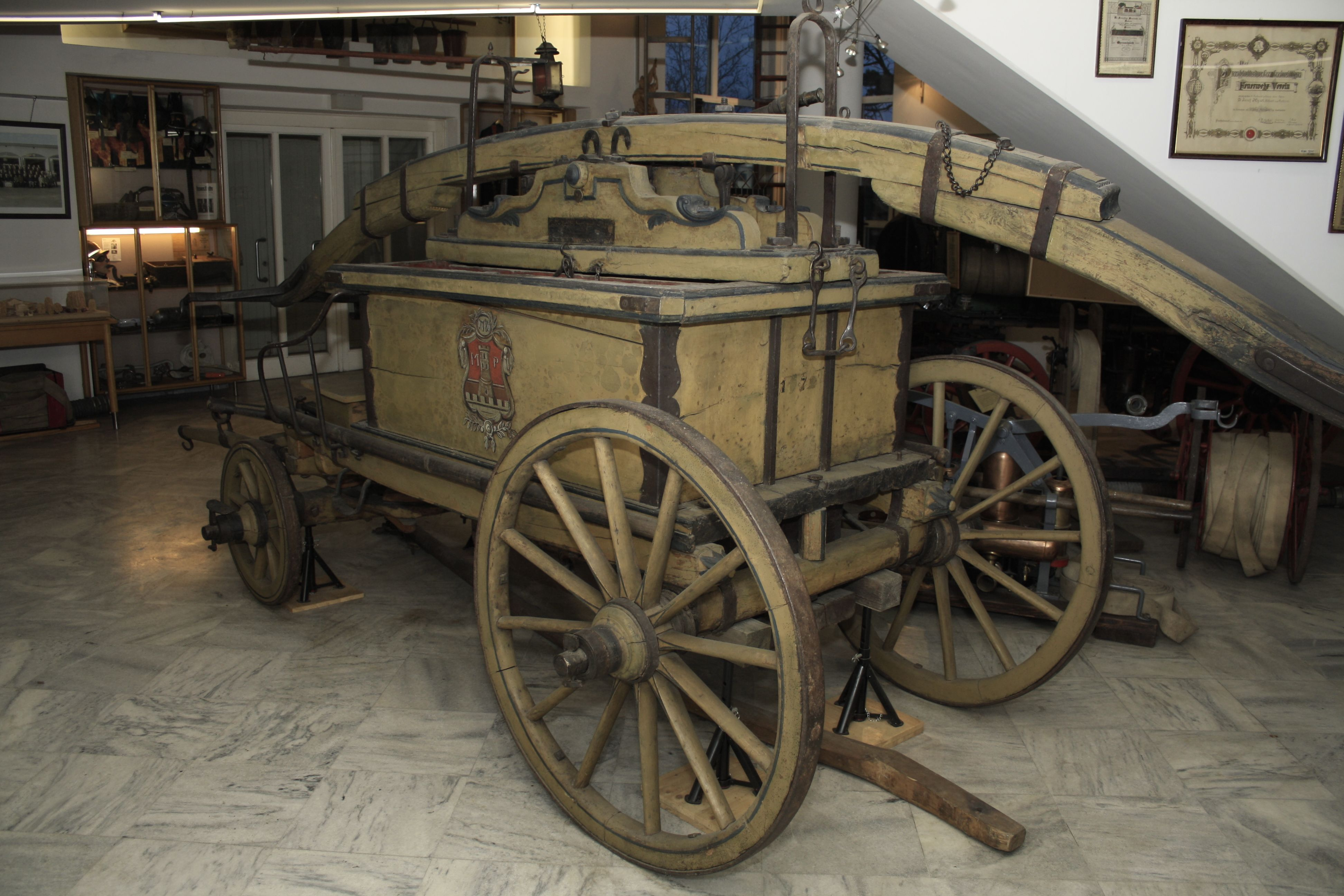 Landfahrspritze aus dem Jahr 1786 mit dem Wappen von Perchtoldsdorf im Feuerwehrmuseum Perchtoldsdorf in Niederösterreich, Doppelschwengel über Steckverbindung verlängert